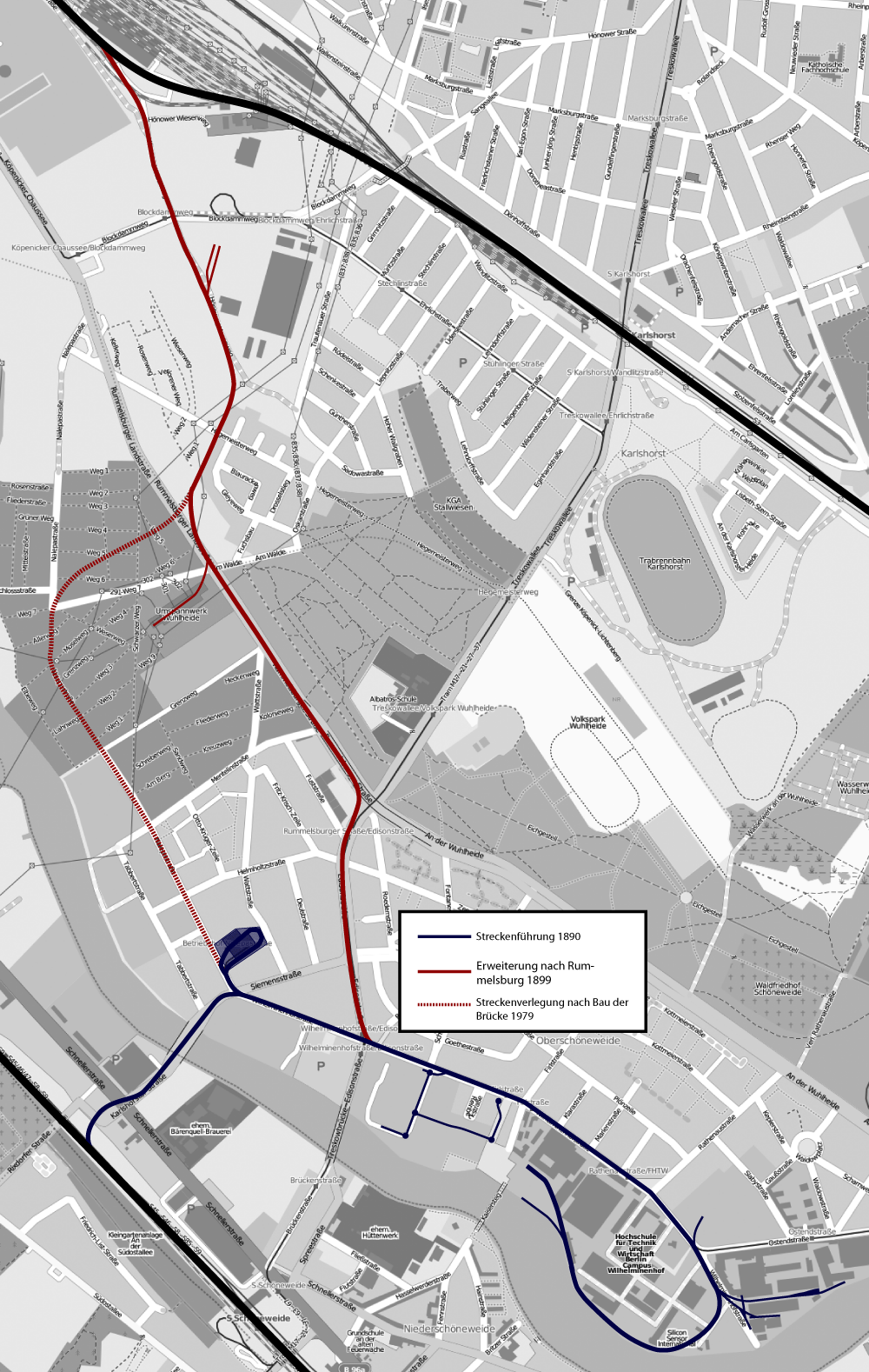 Lageplan der Güterbahn Oberschöneweide